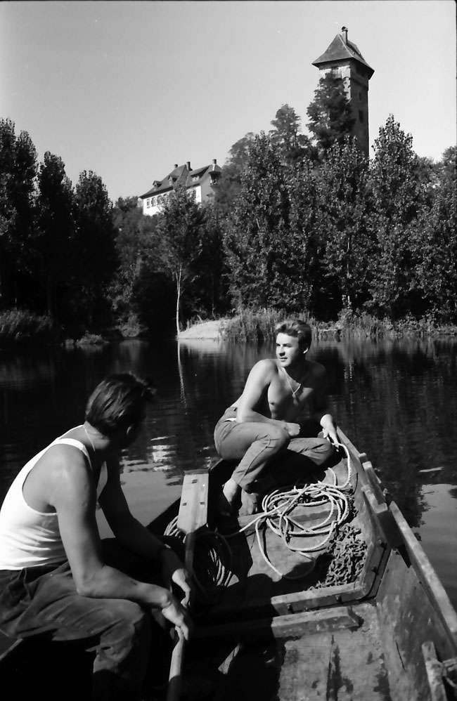 W 134 Sammlung Willy Pragher I: Filmnegative I, Bildordner 3-307 / ca. 1930-1992 Rhein (und Kinzig) [Filmnegative, Ordner 0118] Altrhein Sasbach: Kahnfahrt auf dem Altrhein bis Sasbach, mit Burg Sponeck